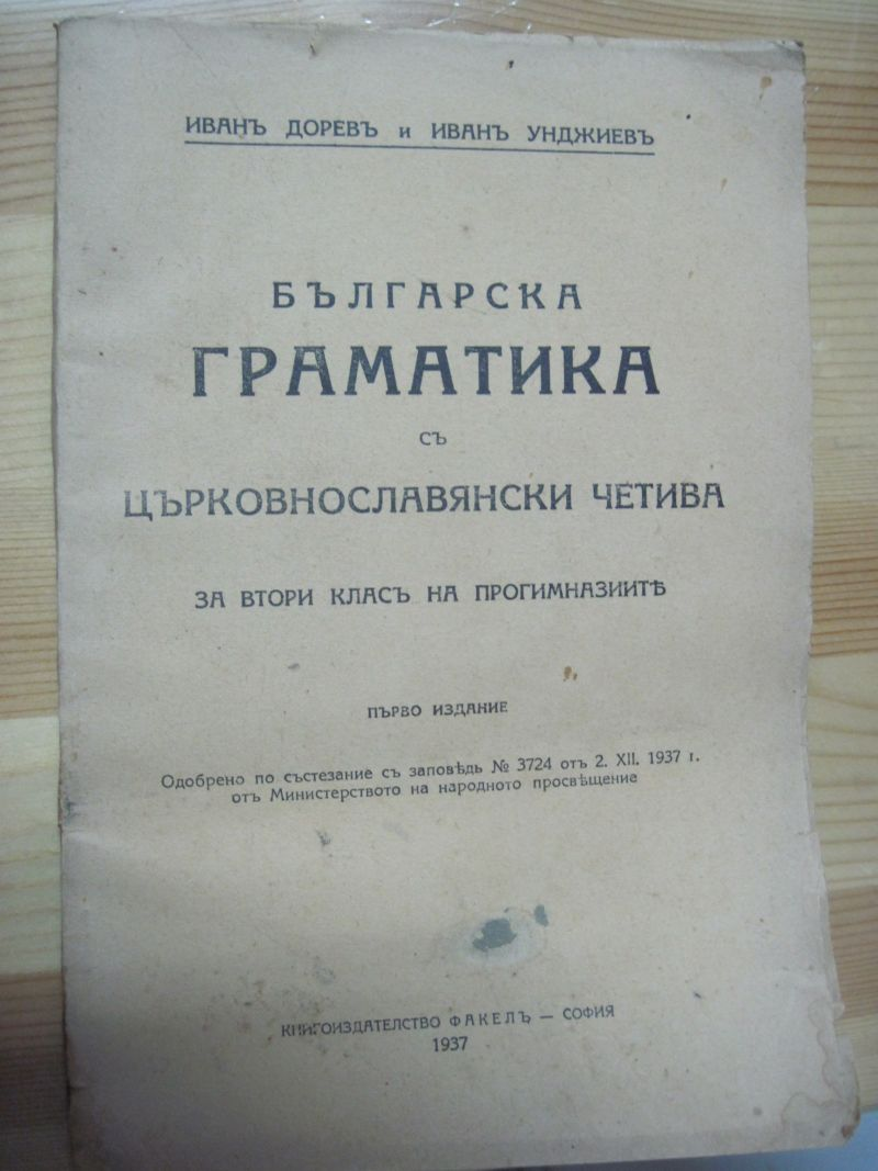 Българска граматика